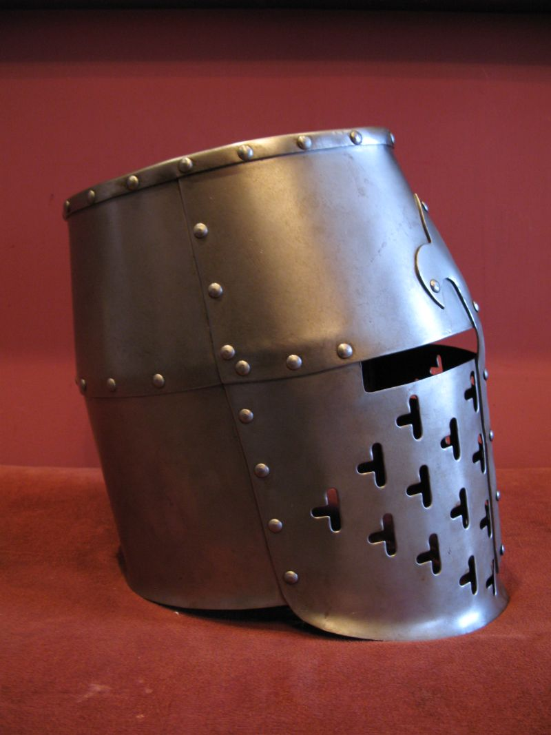 Hełm garnczkowy